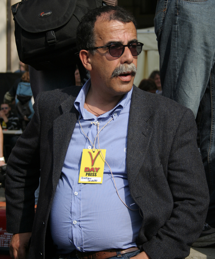 Giornalista di Annozero.